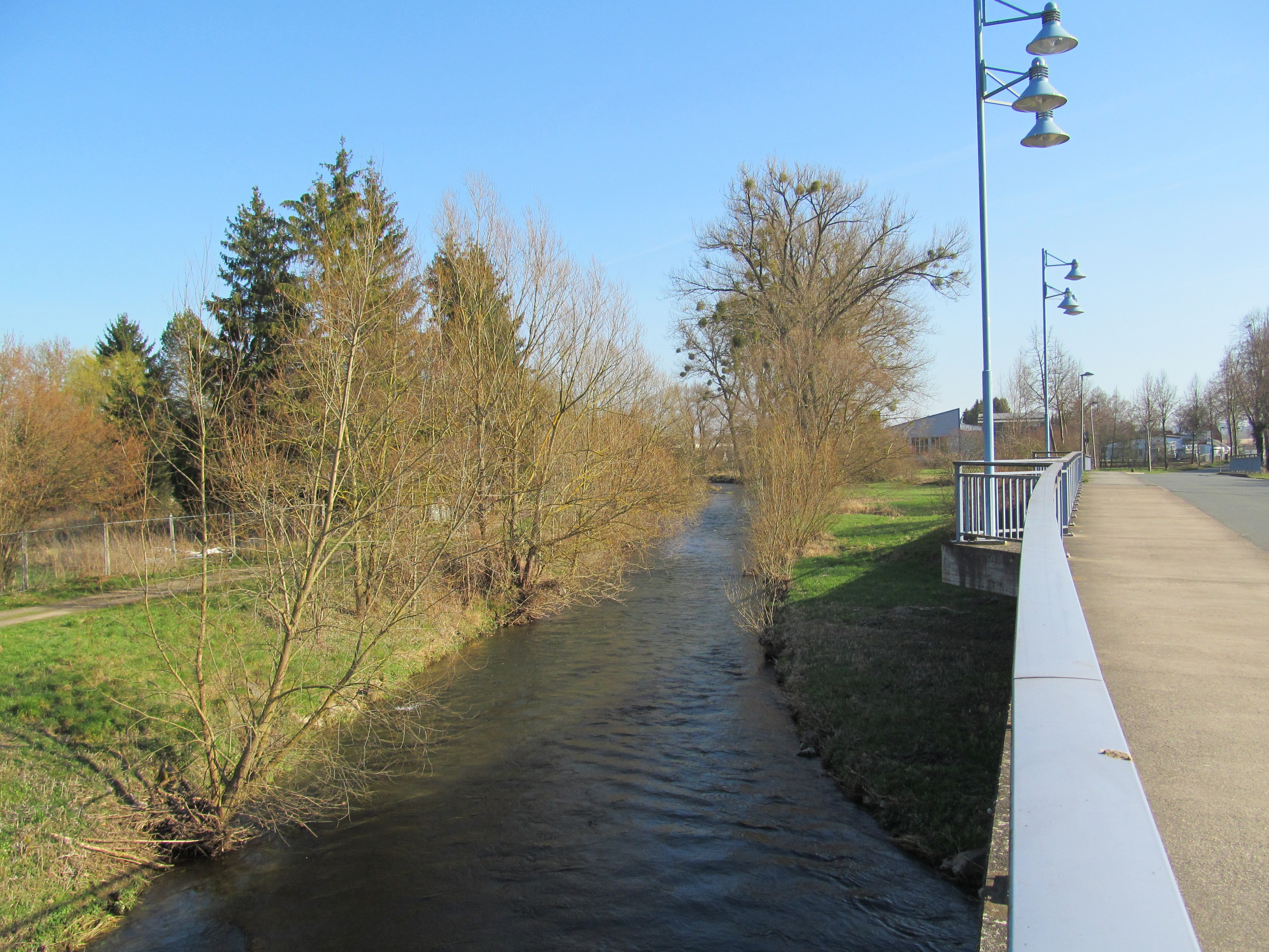 die Ilme in Einbeck unterhalb des Reinserturmweg